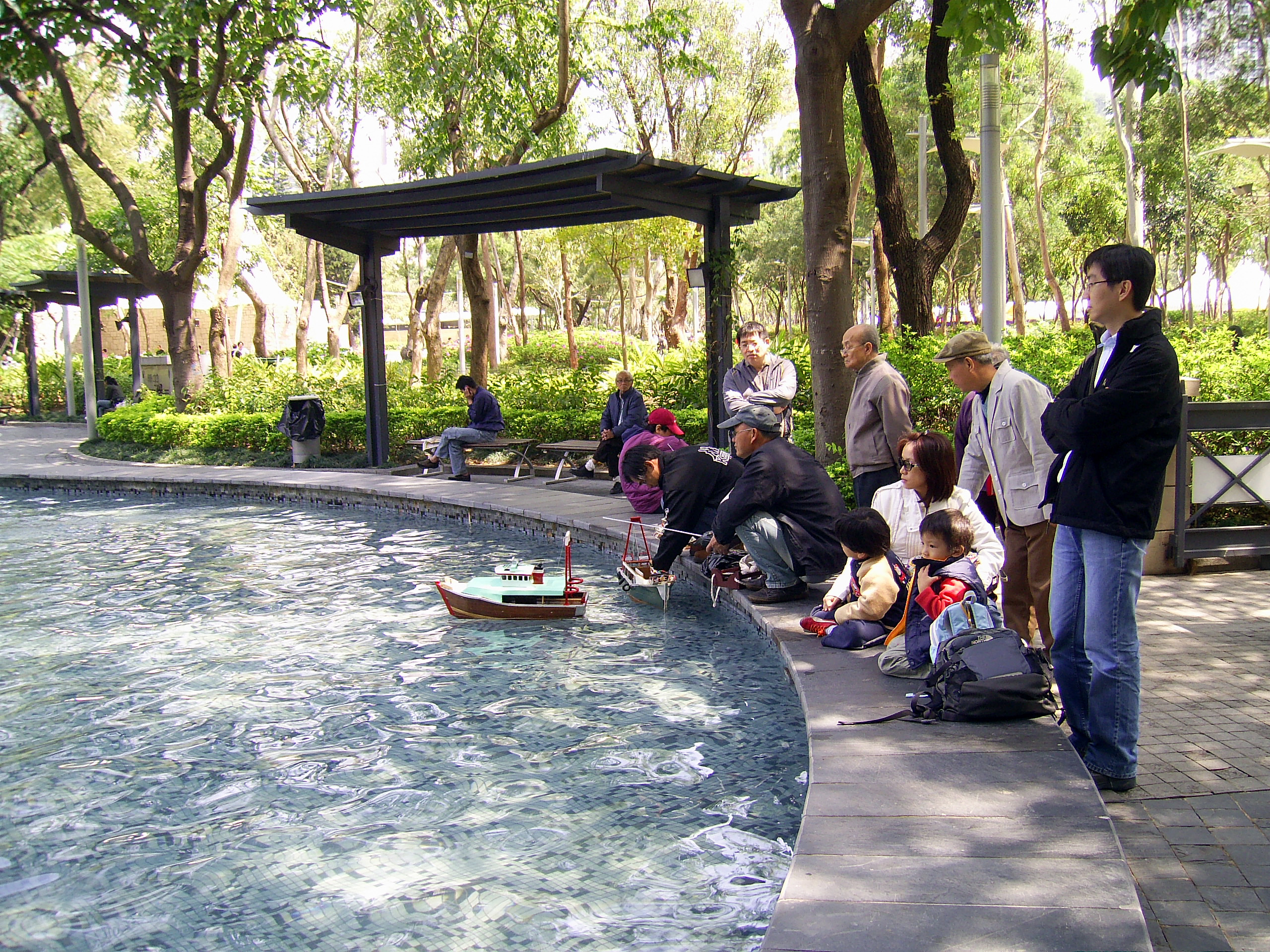 中文（香港）: 維園模型船池